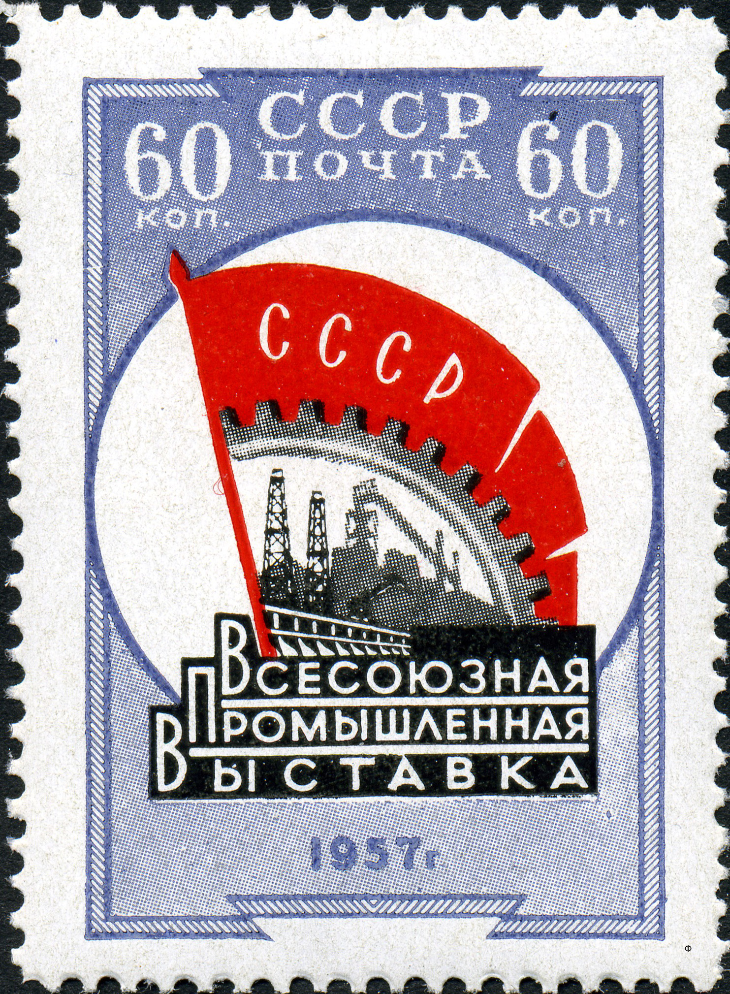 Марка СССР Серия «Всесоюзная промышленная выставка»: эмблема выставки, красная, чёрная, серо-лиловая. Цветная автотипия в сочетании с типографской печатью на мелованной бумаге, перфорирована: линейная зубцовка 12½ (на каждые 2 сантиметра края марки приходится 12½ зубцов). В марочных листах 50 (10×5) и 36 (6×6) марок. Первая марка данной серии («Турбина ГЭС») вышла 20 ноября 1957 года.